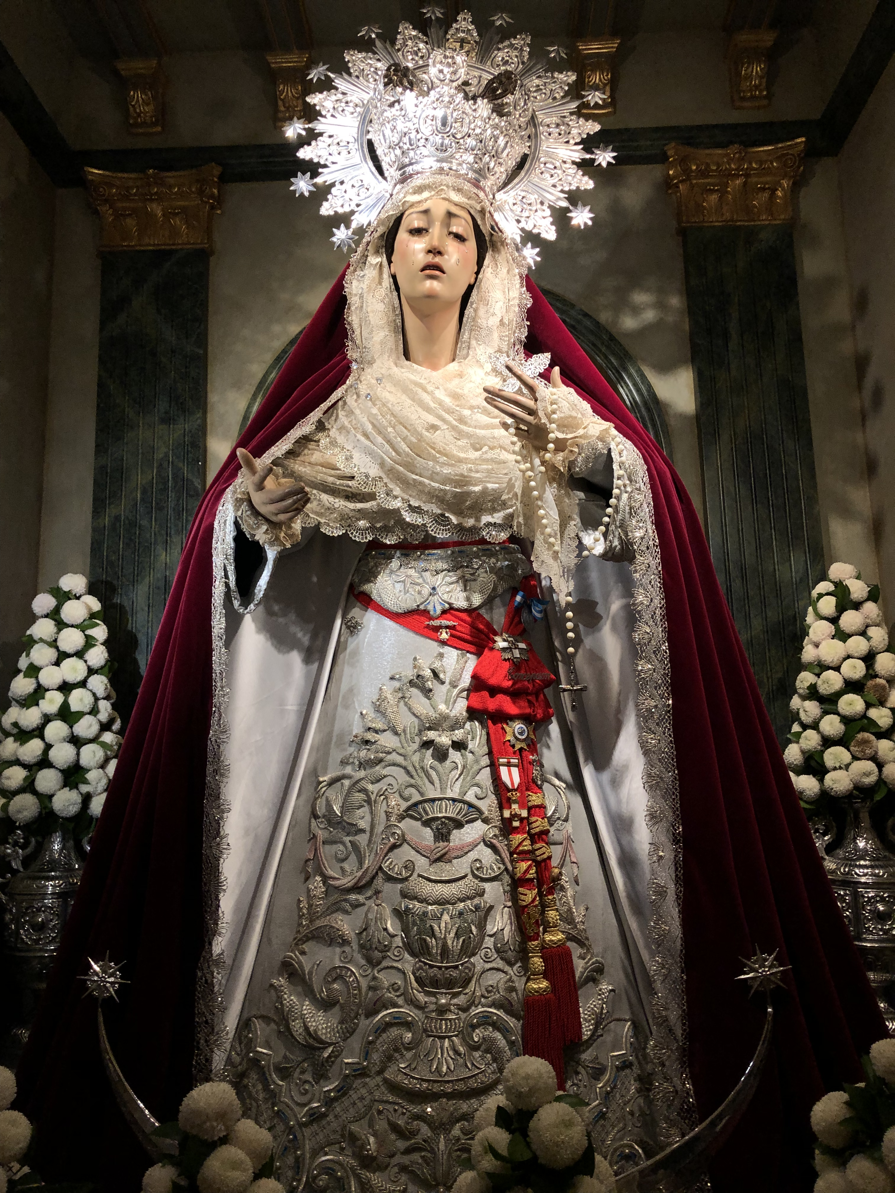 María Santísima de la Concepción